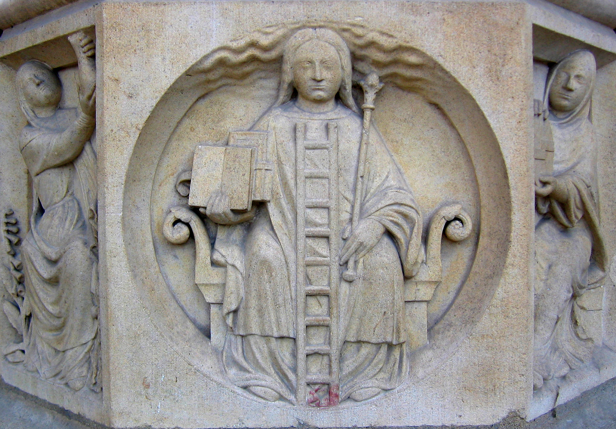 Este relieve se encuentra en el pilar de la entrada central de la catedral de Notre-Dame de París. Según Fulcanelli, representa a la philosophia. Autor:Chosovi.